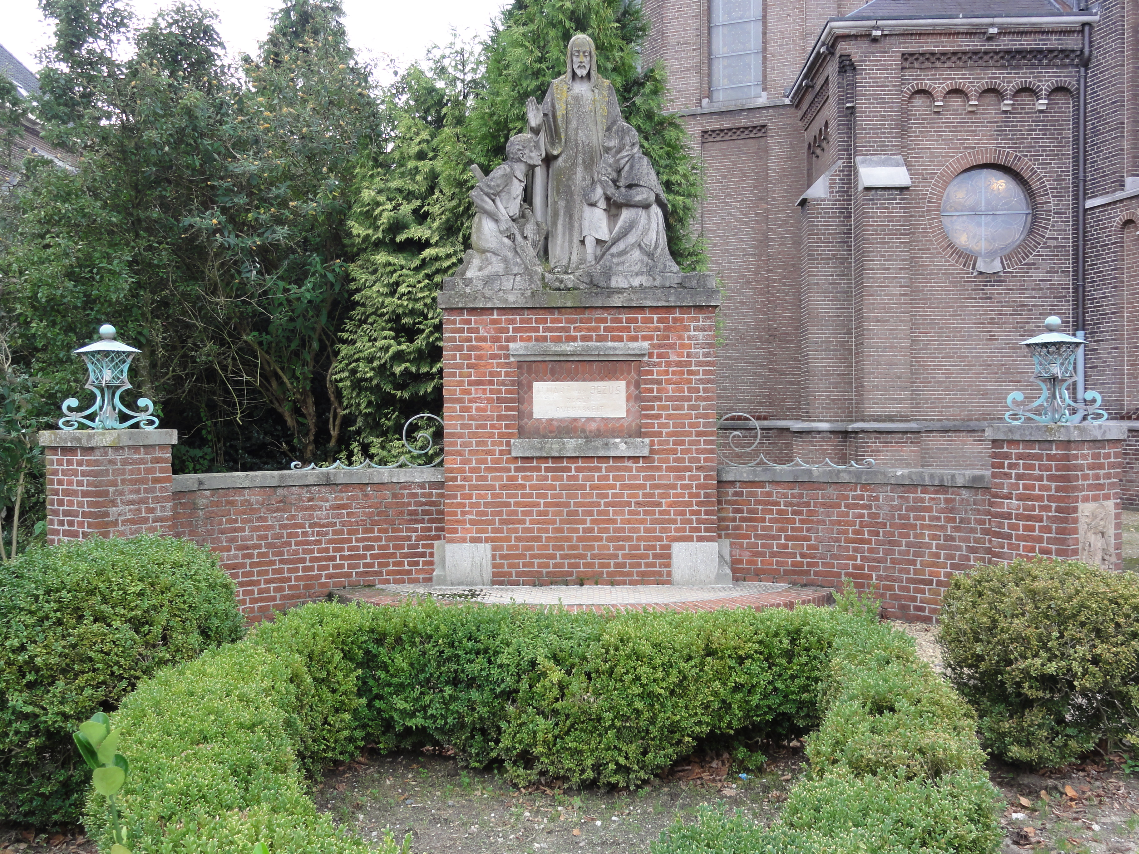 (Overasselt (Heumen) Rijksmonument 523923 H.Hartbeeld